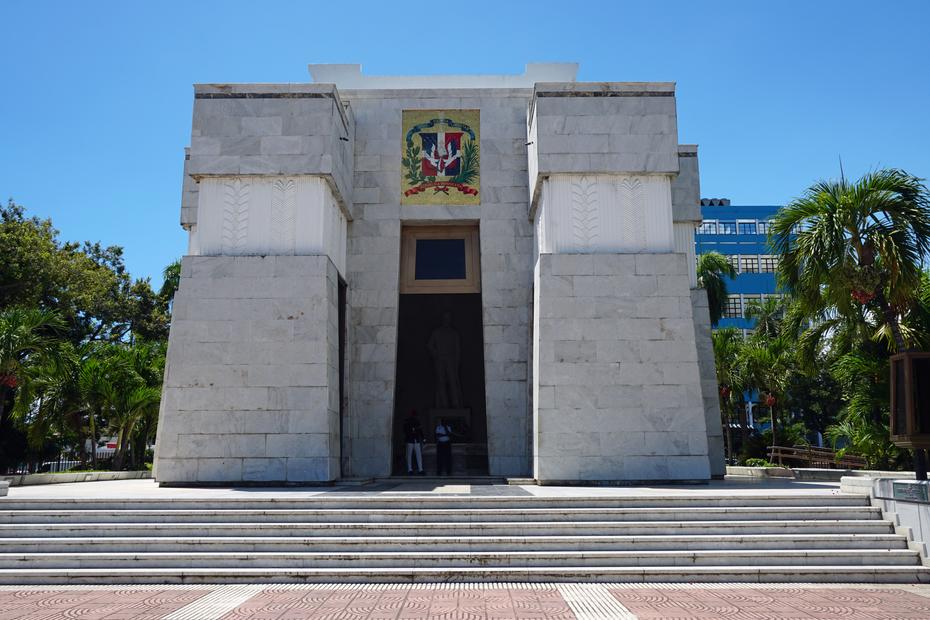 Mausoleo Altar de la Patria, Parque Independencia, Ciudad Colonial Santo Domingo, República Dominicana.